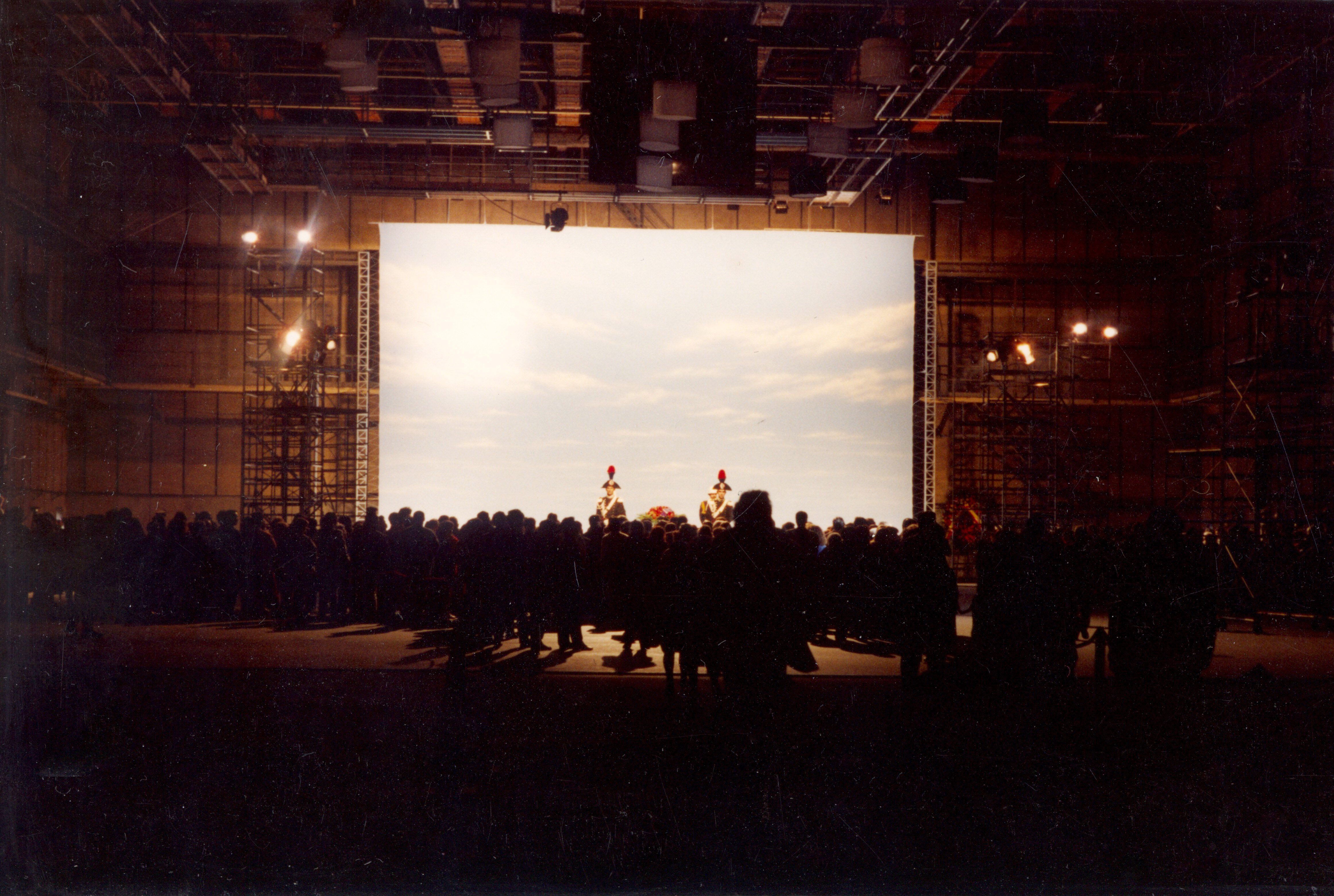 Afin que les romains puissent rendre un dernier hommage à Federico Fellini, son cercueil fut exposé au Teatro 5, celui qu'il affectionnait. Sur le fond, le décor de ciel peint utilisé pour une scène de son film Intervista (1987).